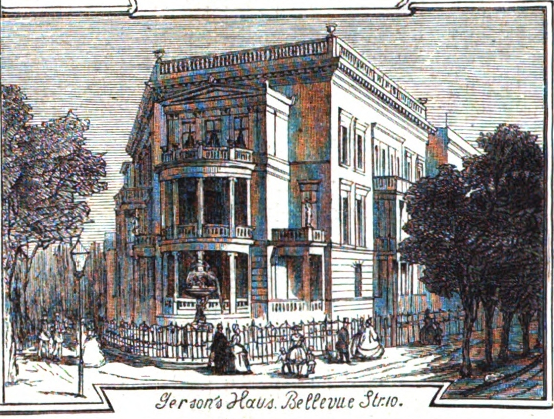 Haus Gerson in der Bellevue-Straße Nr. 10 in Berlin, 1866.